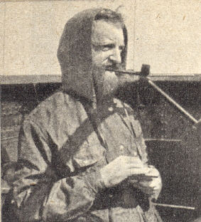 Johannes Frans van Dulm op de brug van de Hr.Ms. O 21 (1940)